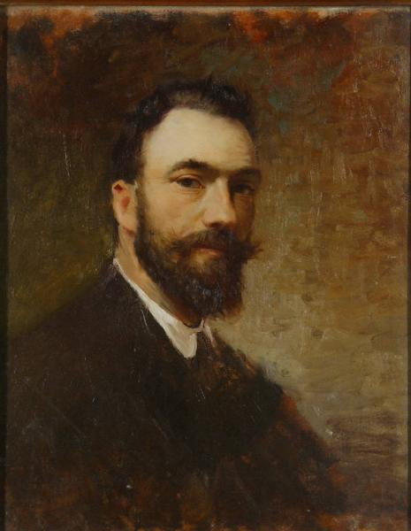 Autoritratto del pittore Enrico Crespi.